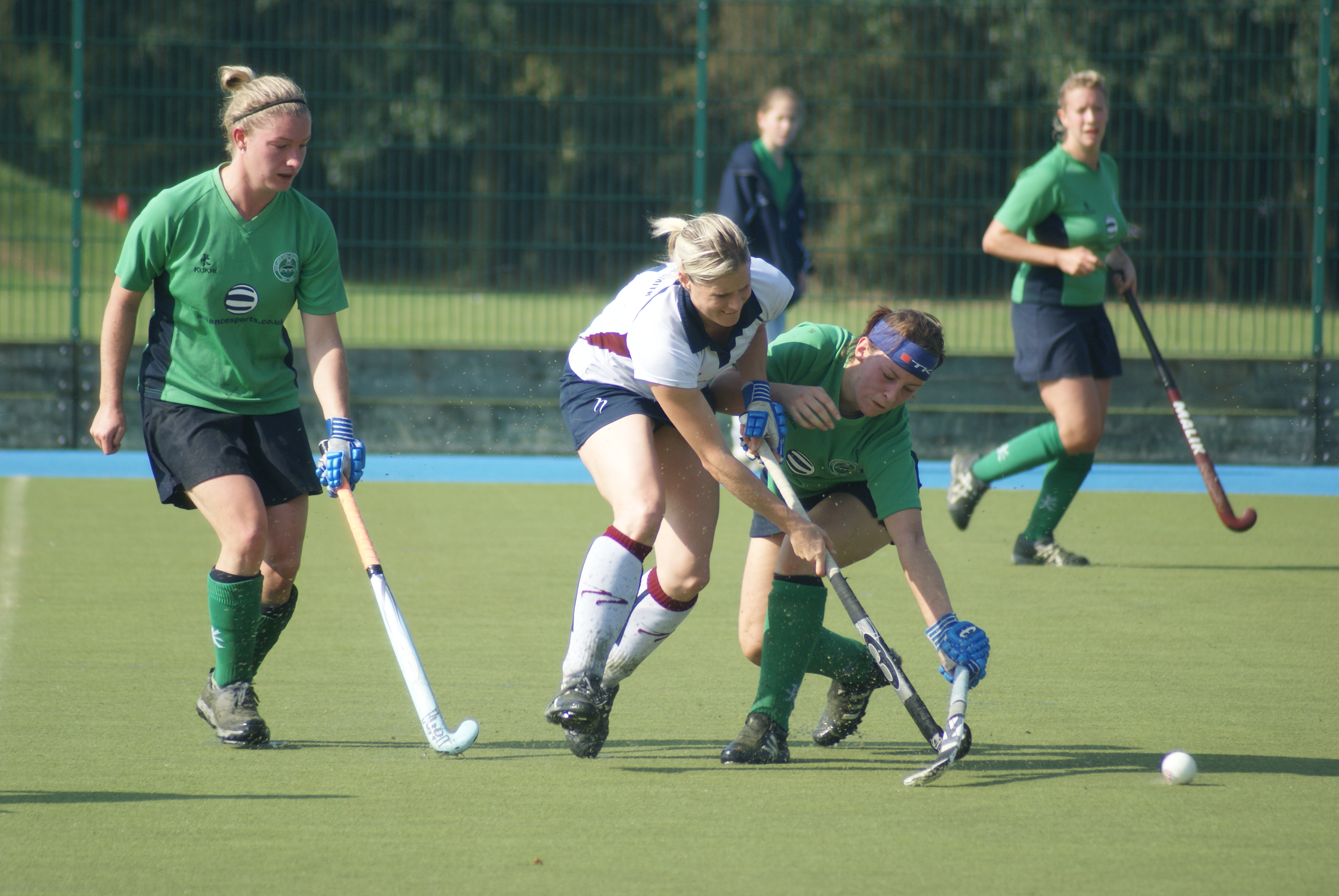 Denise Marston-Smith